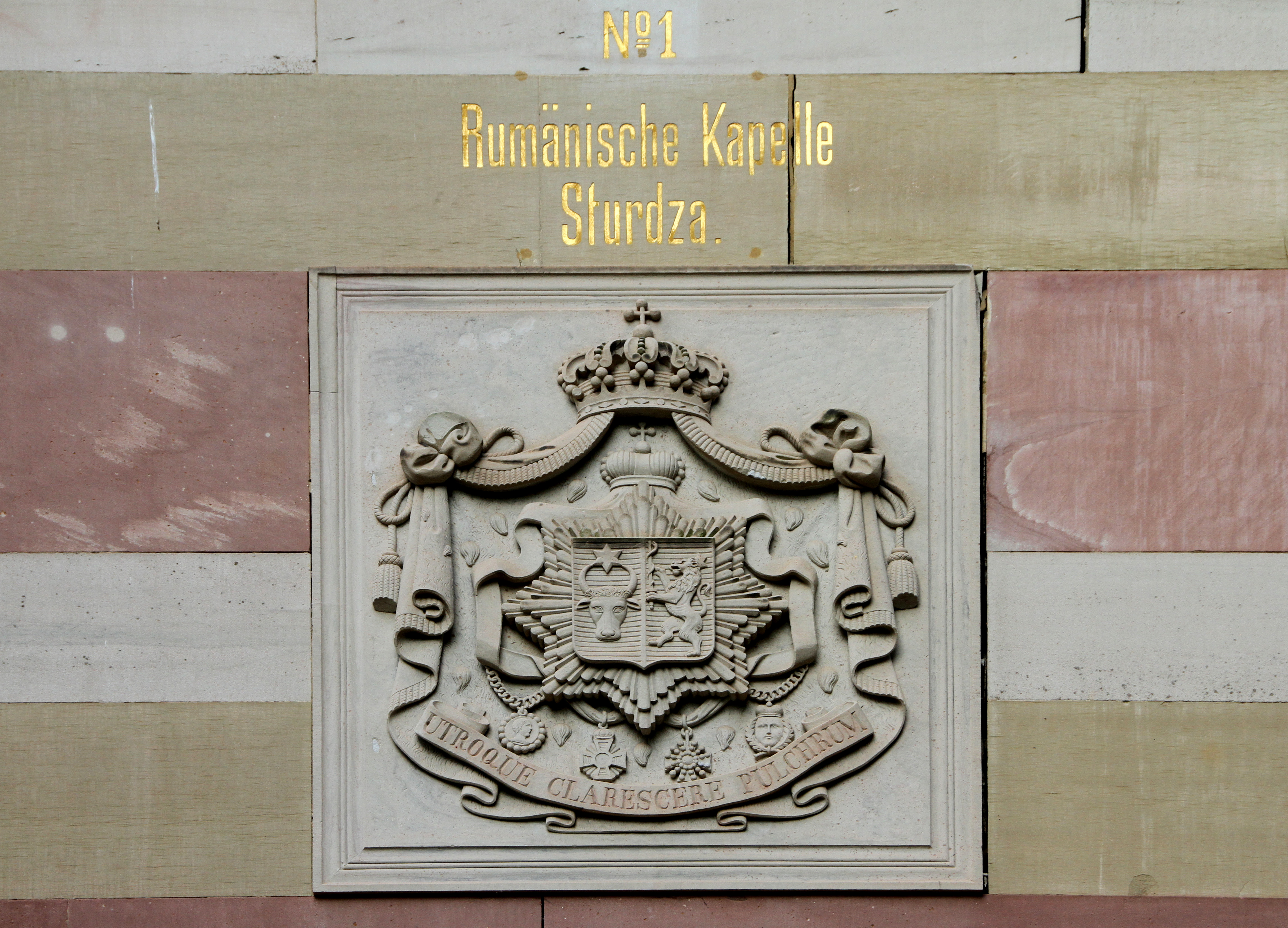 Wappen an der rumänisch-orthodoxen Stourdza-Kapelle auf dem Michaelsberg in Baden-Baden, zwischen 1863 und 1866 im neoklassizistischen Stil nach Plänen von Leo von Klenze und Georg von Dollmann erbaut.